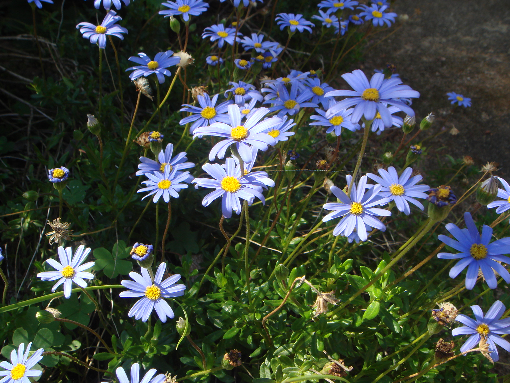 Felicia amelloides, Jardín Botánico de San Fernando, Cádiz, España. Planta originaria de Sudáfrica.